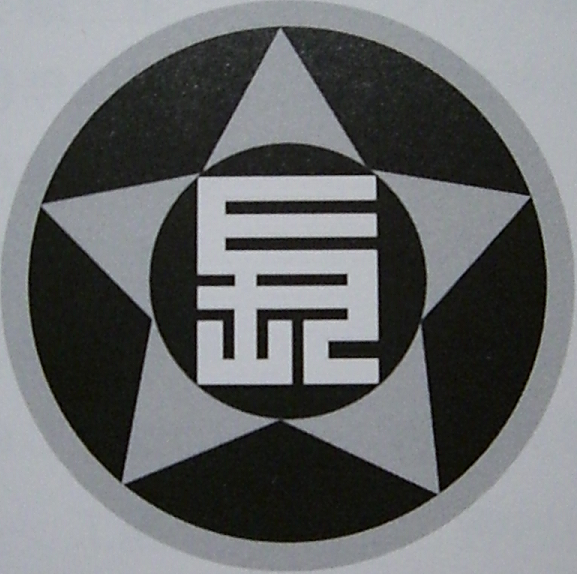 神戸市立長尾小学校の校章